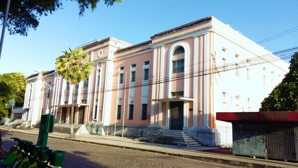 Vista da frente da Faculdade de Direito do Ceará.